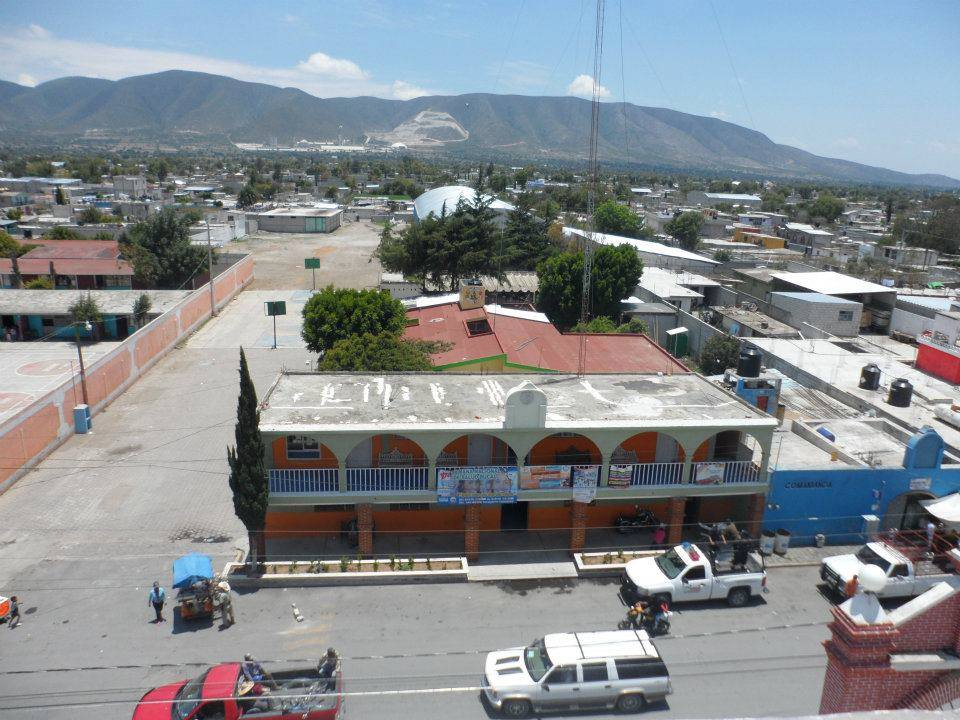 Panorámica y sede de la presidencia Auxiliar Municipal de Palmarito Tochapán. Fotografía Jeshua Geraldi © D.R.